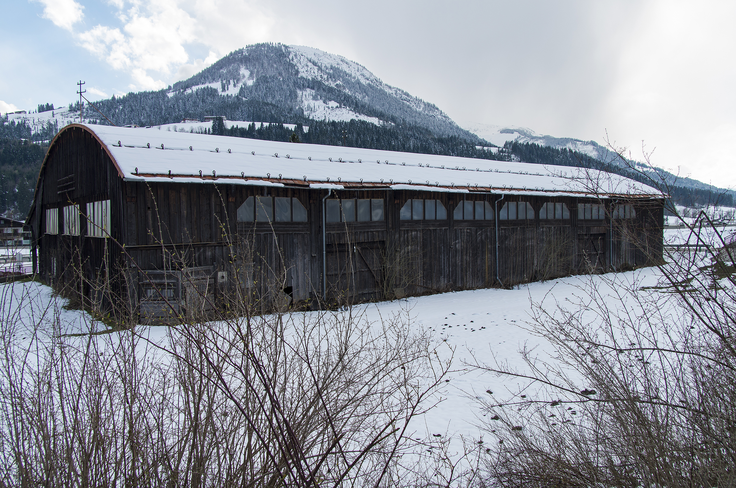 Fabriksgebäude, Holzfachwerkshalle, Eichenhalle. Im Hintergrund der Gaisberg (1770m).